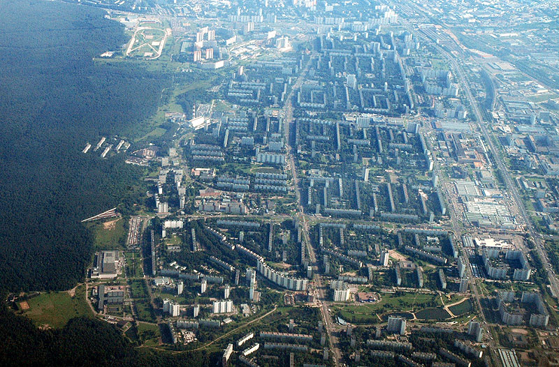 Чертаново. Район МосквыВид с самолёта, район Чертаново (Москва)